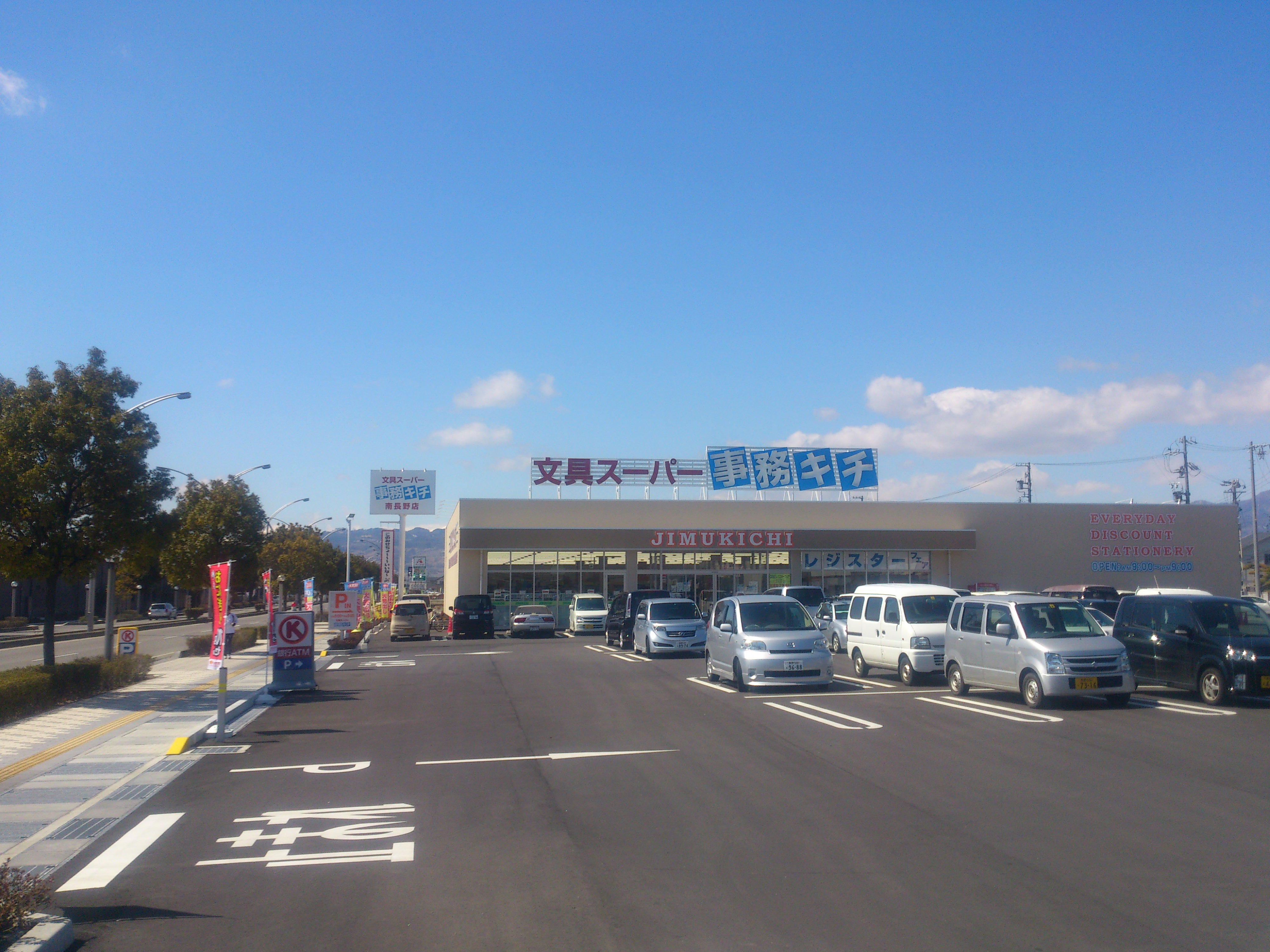 文具スーパー事務キチ 南長野店（長野市篠ノ井杵淵）